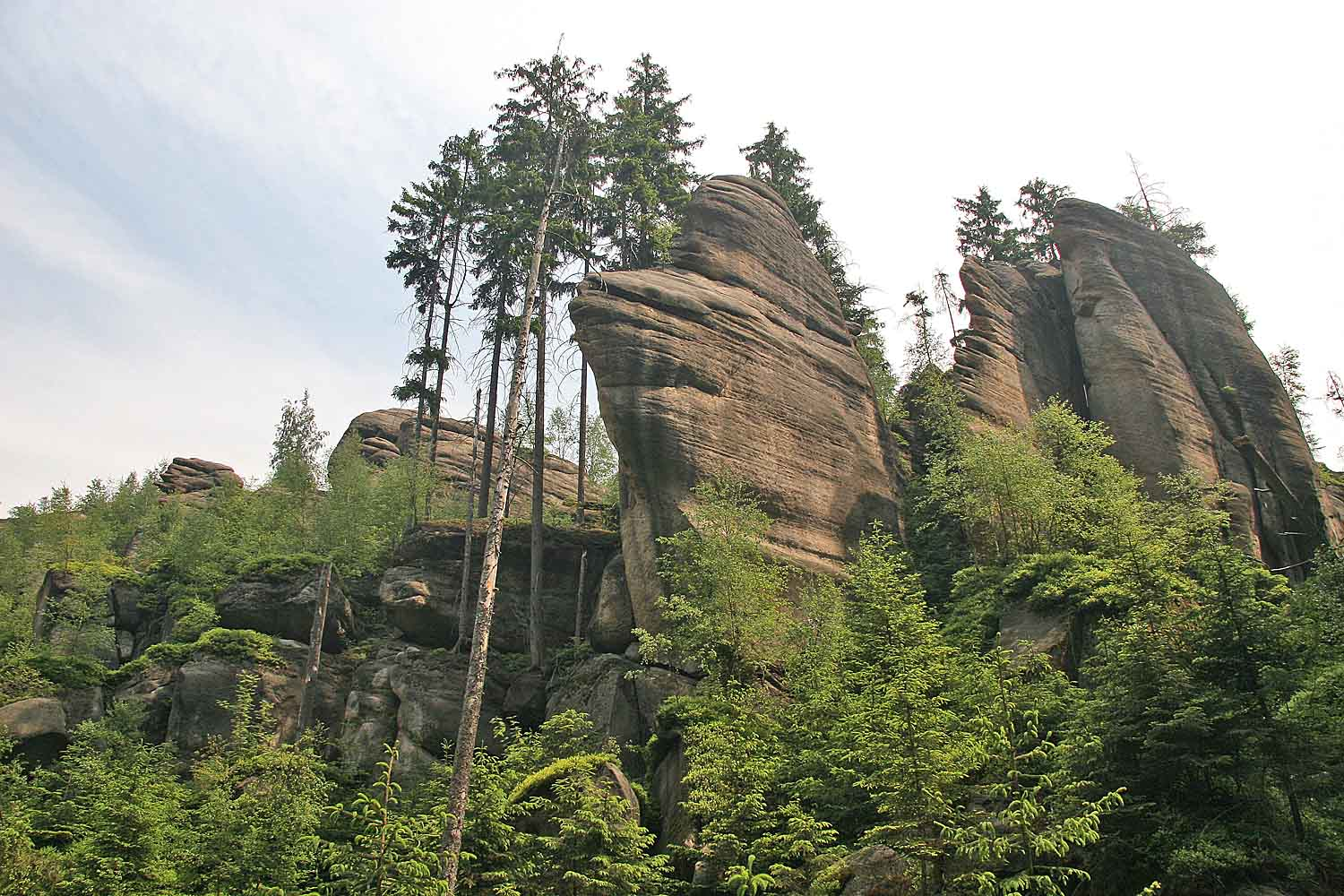 Písková rokle v NPR Broumovské stěny - střední část